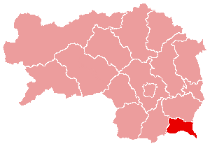 Karte: politischer Bezirk Radkersburg Lizenz: GFDL Quelle: Zeichnung plp Datum: de:2004 Ort: Wien